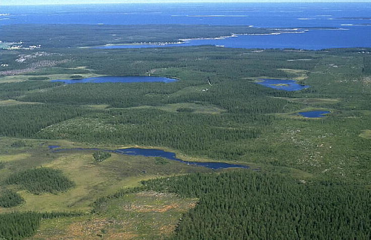 Orrmyran, gravfältet "Arkeologstigen". Motiv: Jävre Nyckelord: Flygbilder, Riksintressen Kategori: Kust- och skärgårdsmiljöOrrmyran, gravfältet "Arkeologstigen".